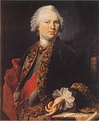 «Гуттенбрун Людвиг. Портрет князя Степана Борисовича Куракина. Музей изобразительных искусства города Орёл»